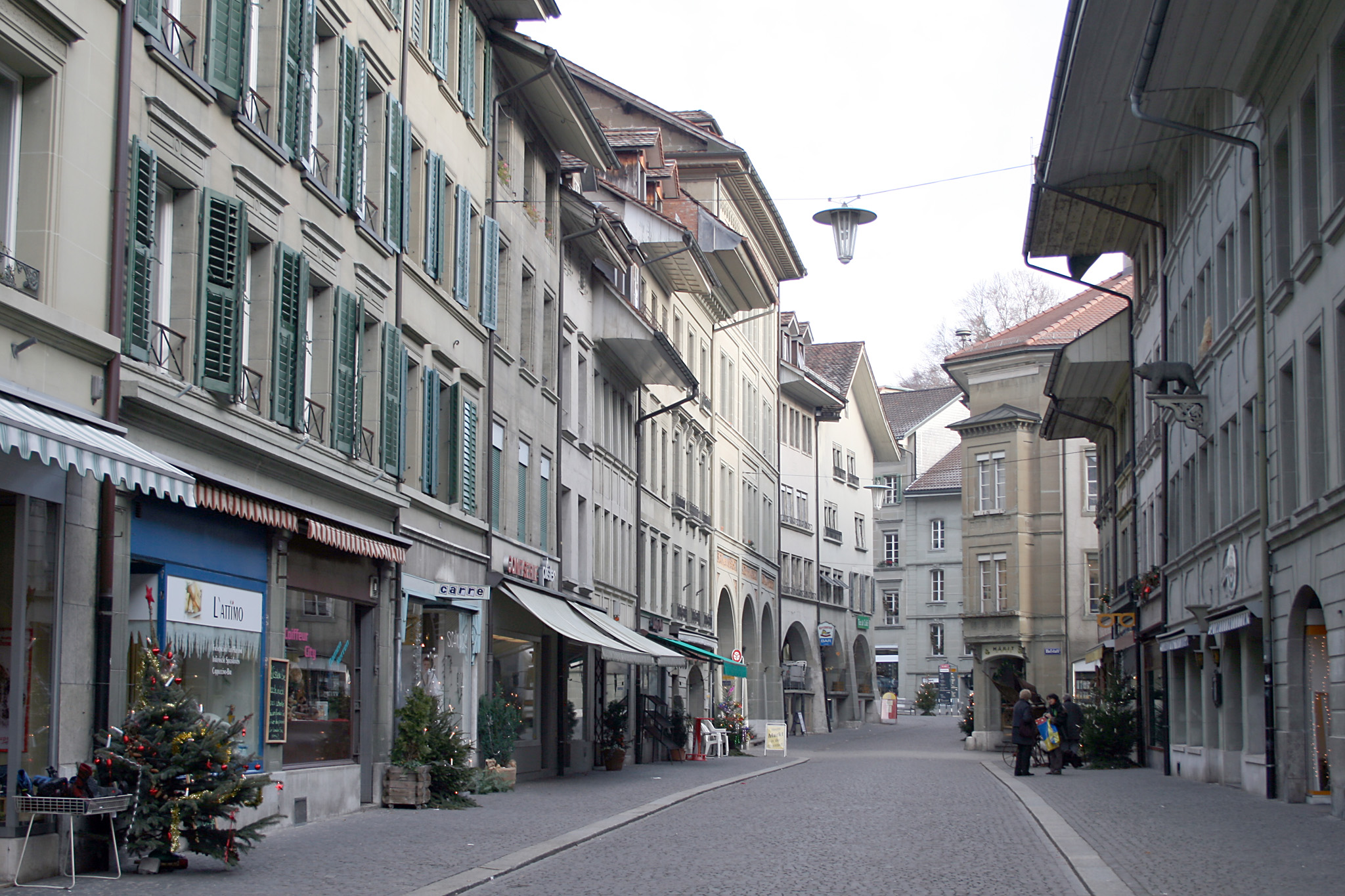 Burgdorf, Switzerland